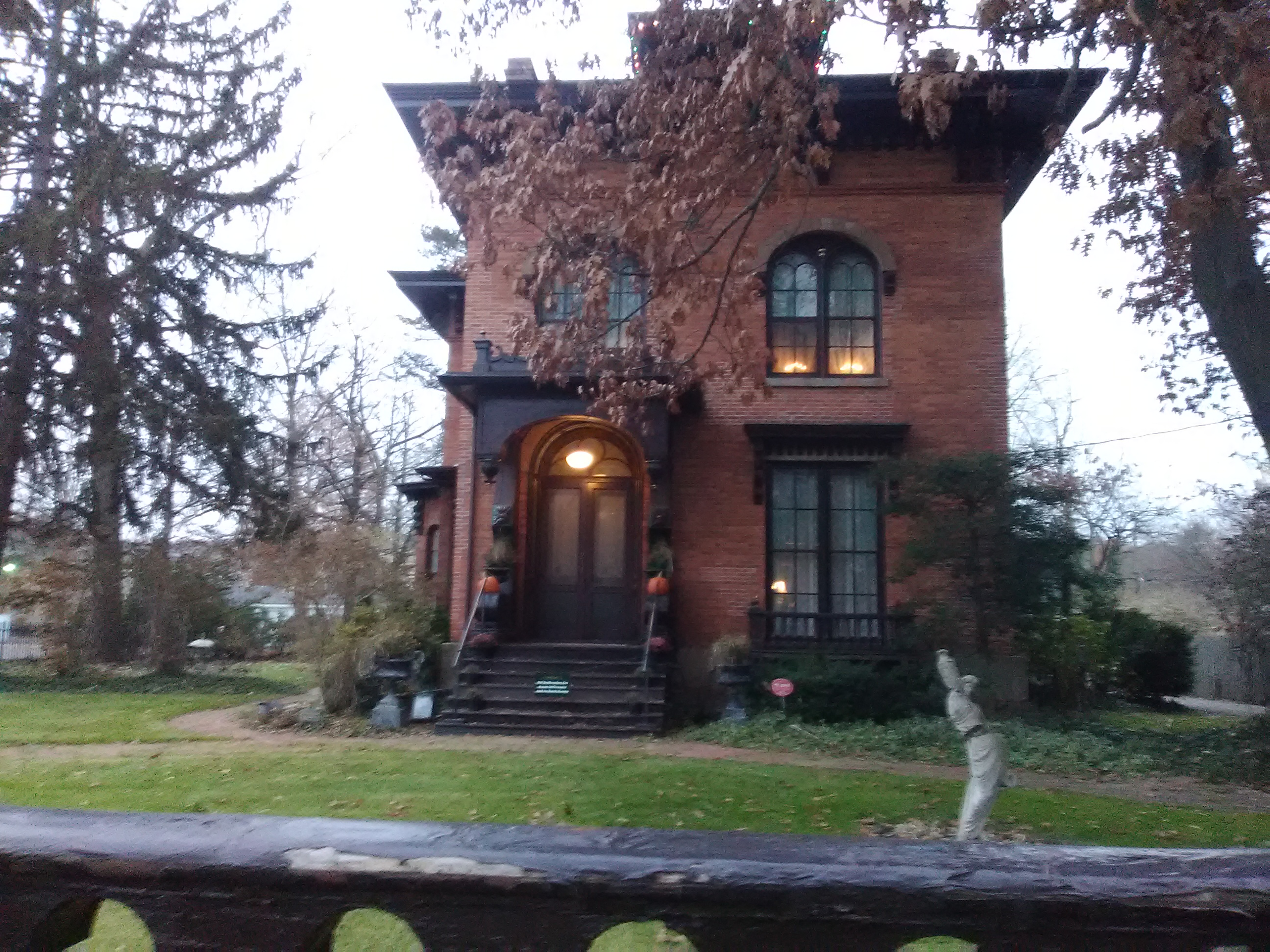 Avenue Woodward, Kalamazoo